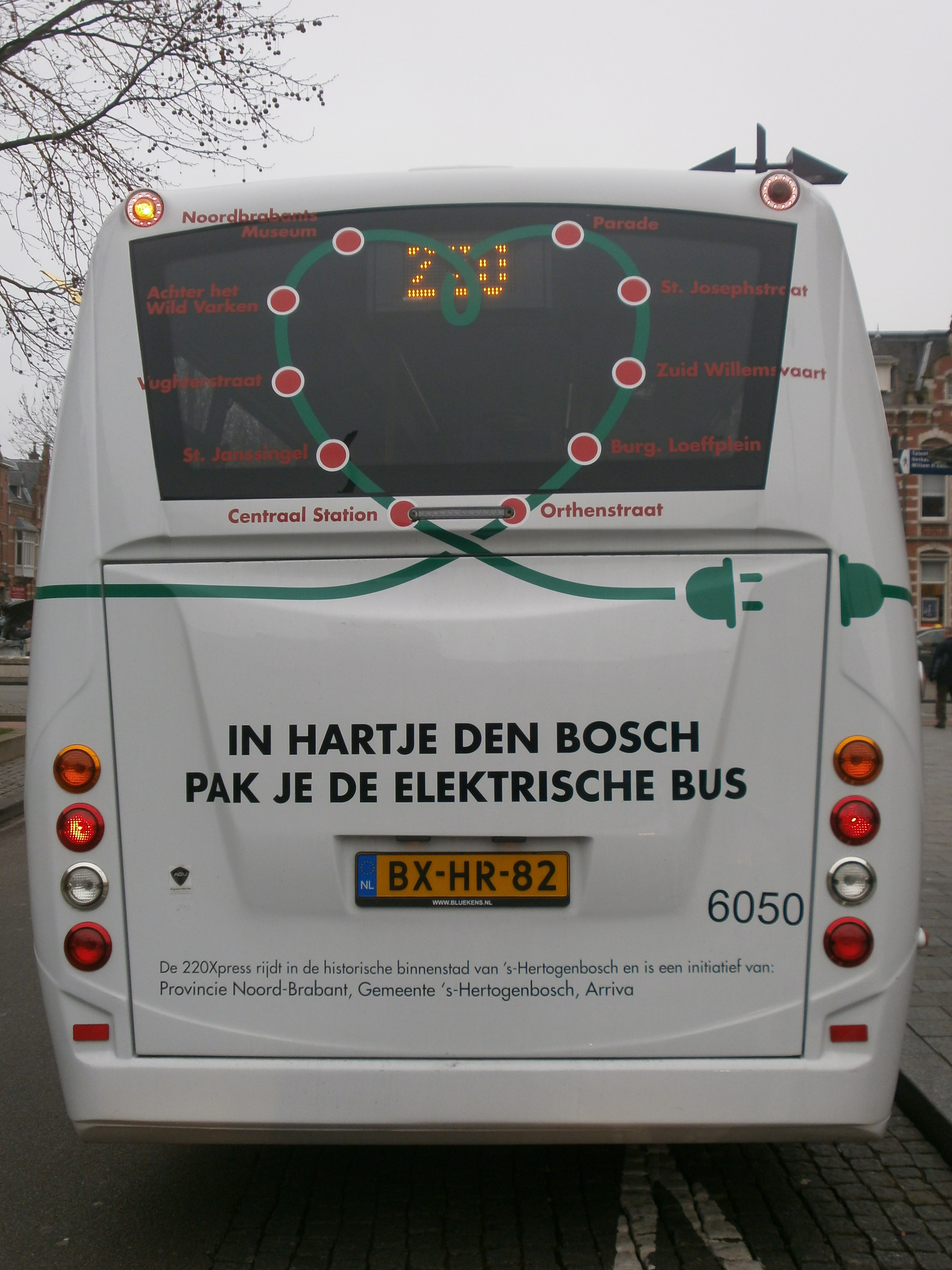 De achterkant van de elektrische bus die dienst doet op de 220Xpress in 's-Hertogenbosch, volgens de nieuwe huisstijl.